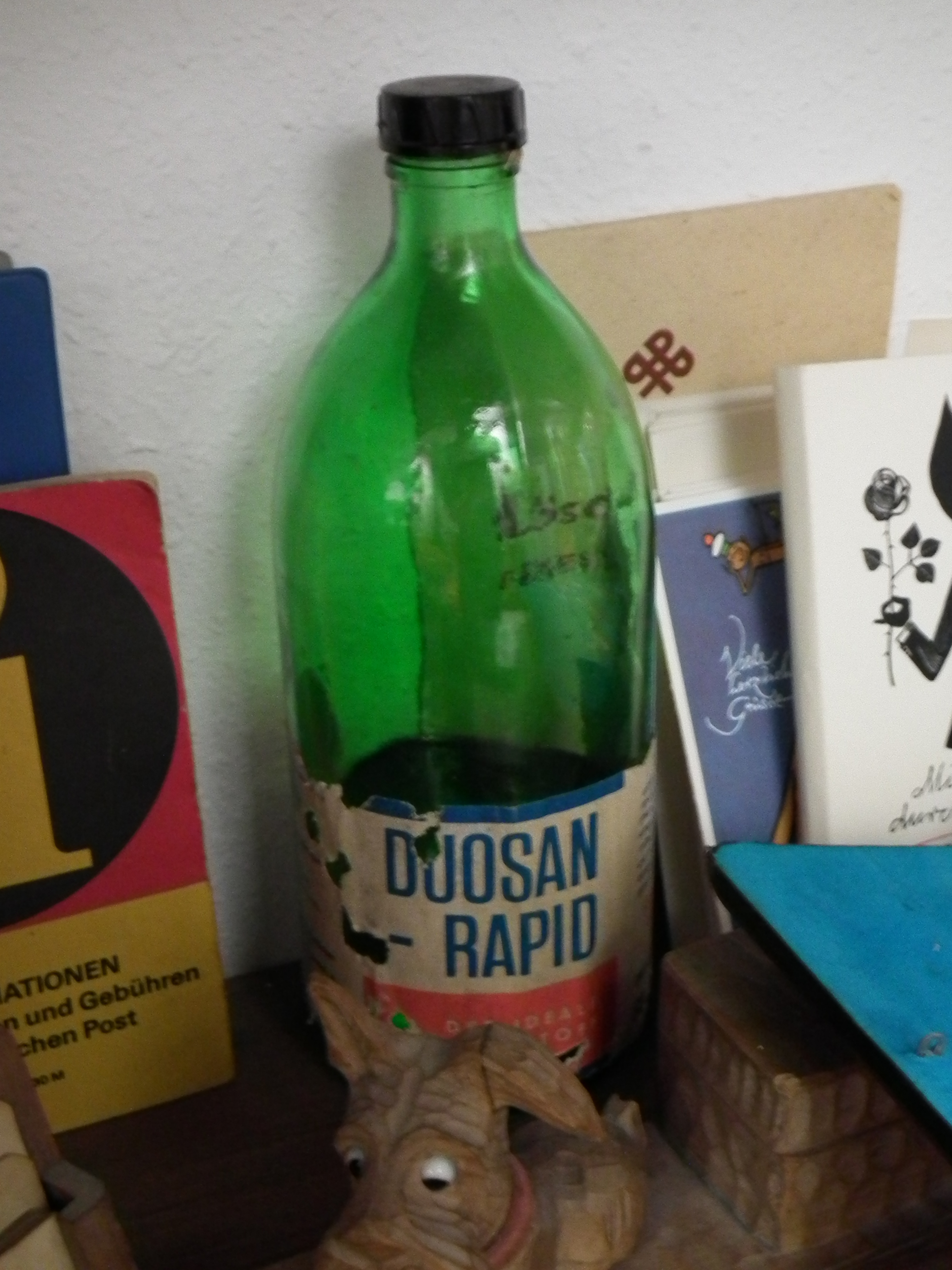 N’Ostalgiemuseum Leipzig